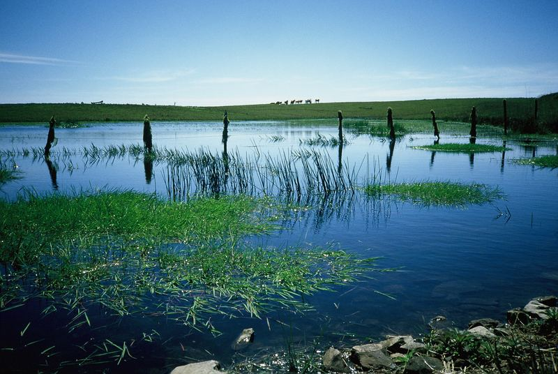 Itaimbezinho, Aparados da Serra, Brasilien